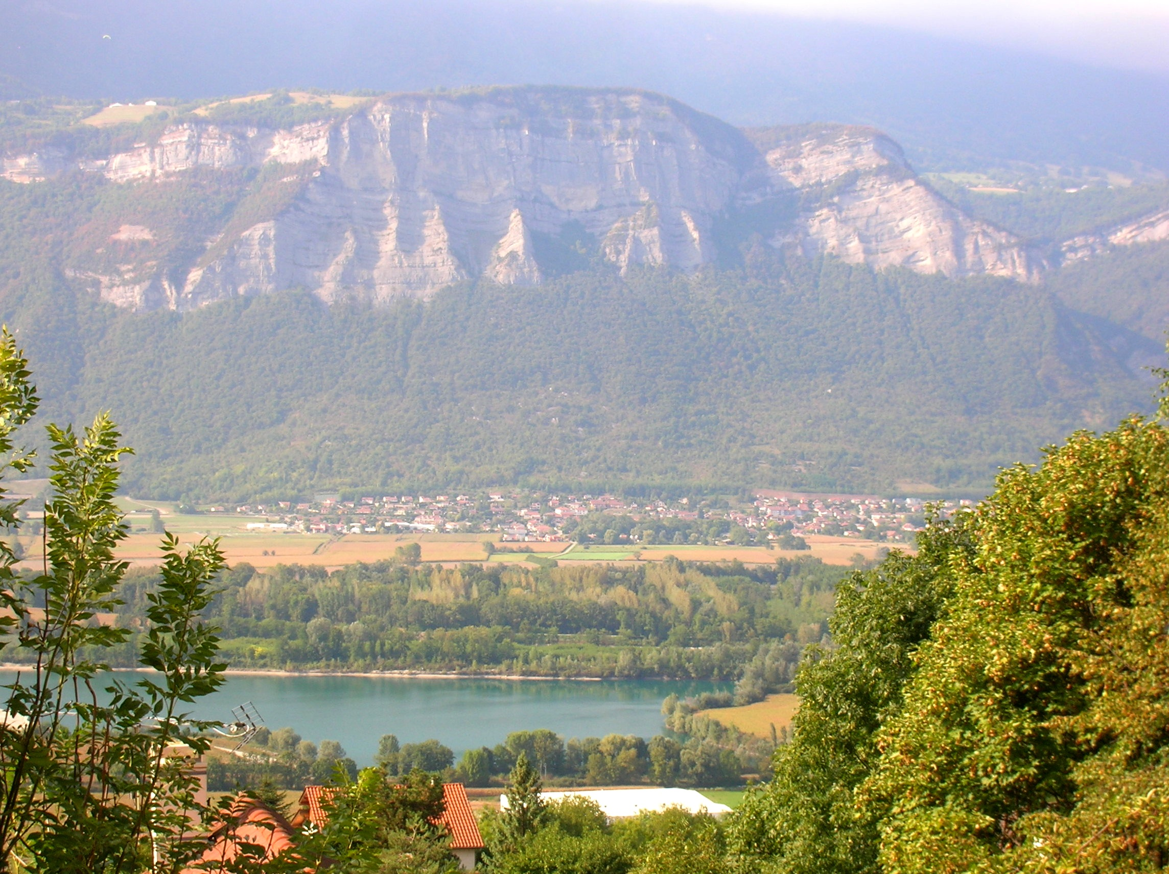 Carrière silico-calcaire d’origine fluviale de SMAG au Grand Pré. Panorama depuis Le Champ-près-Froges, Isère, AuRA, France.